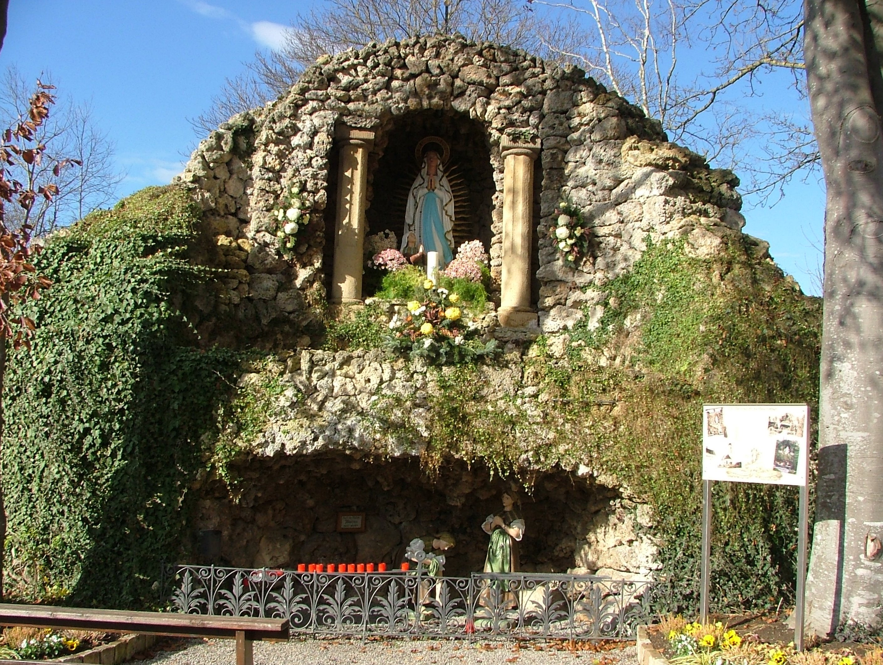 Mauerstetten